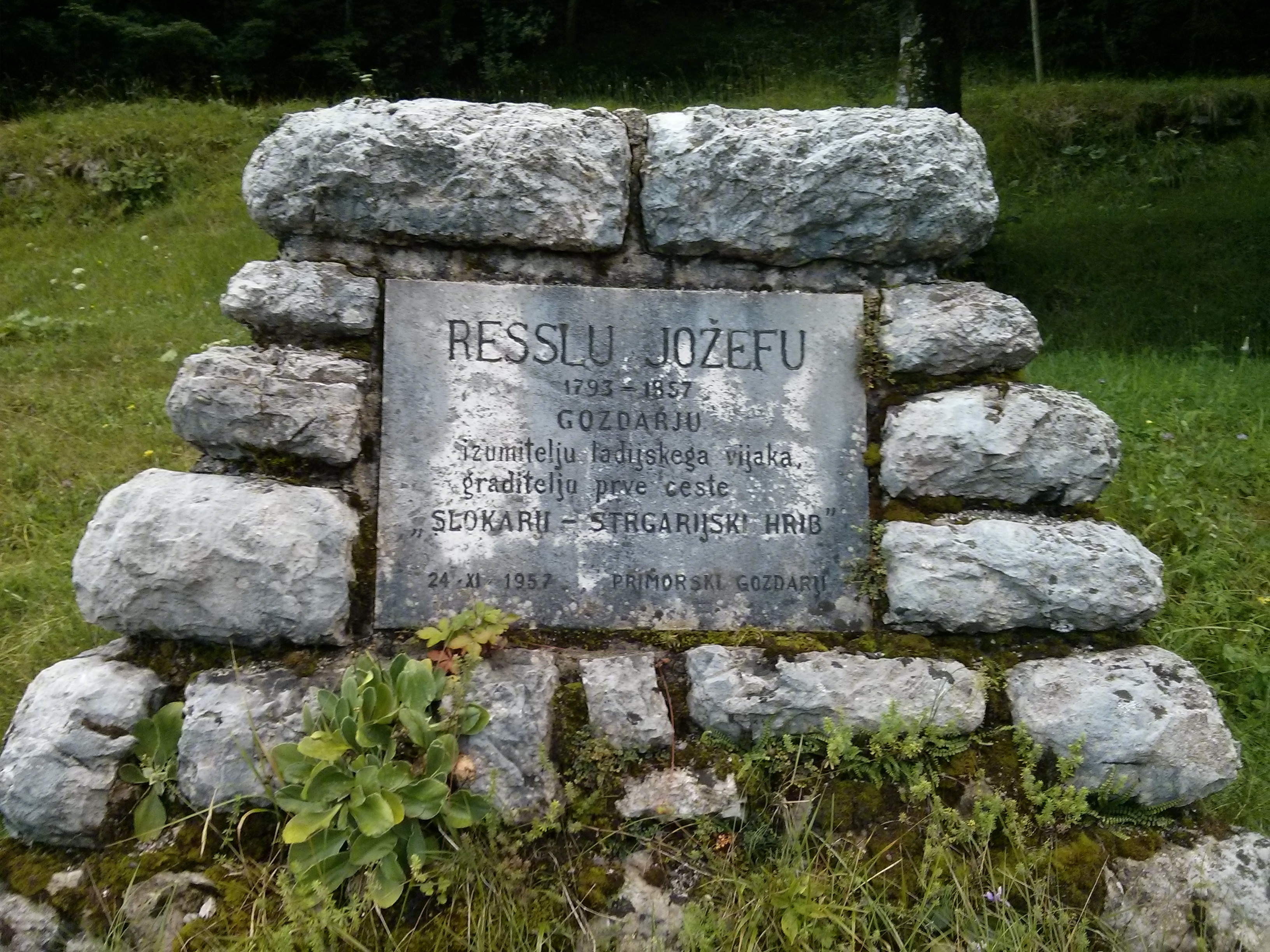 IMG_20140827_191245